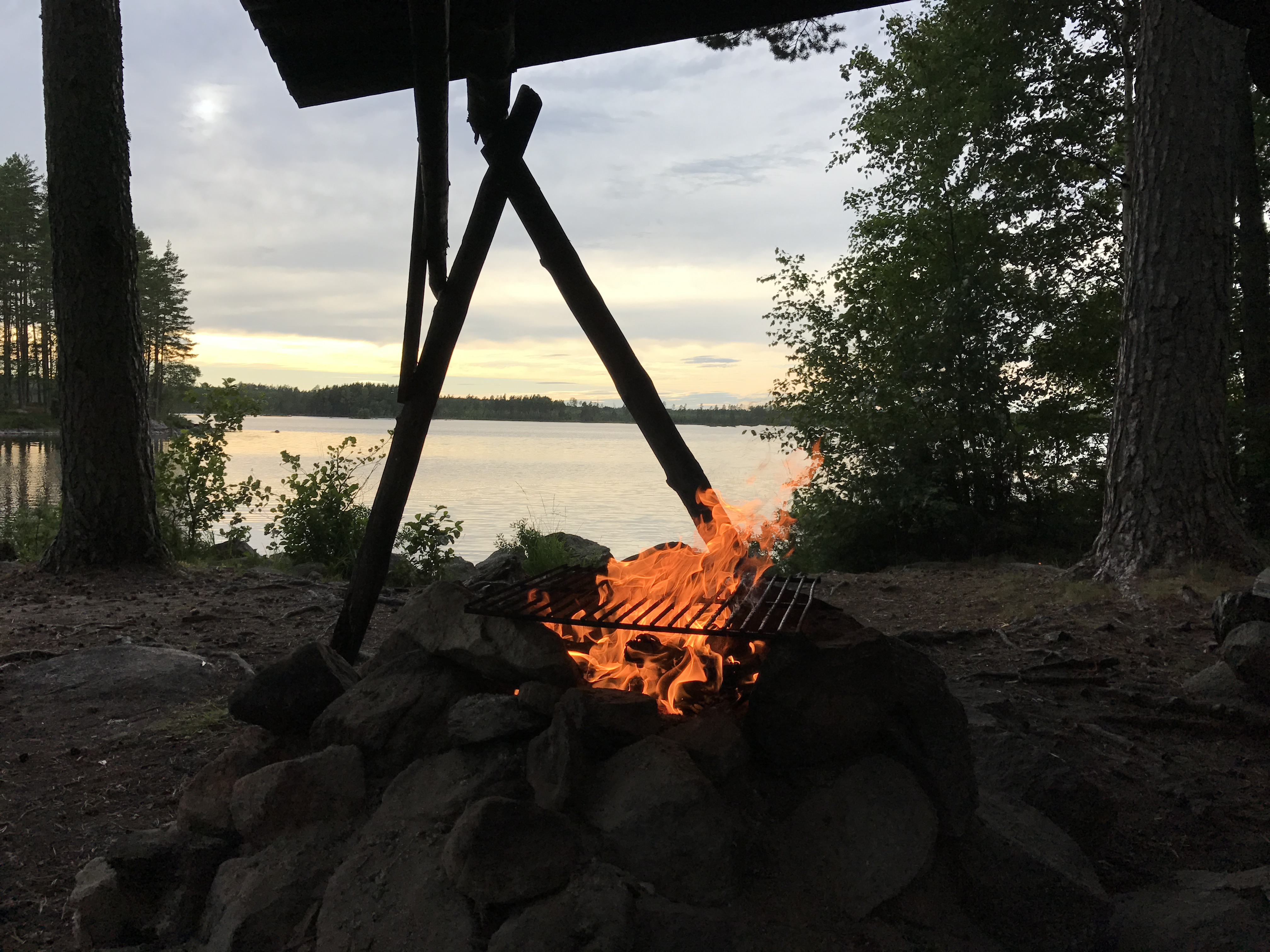 Eldstaden vid vindskyddet vid badplatsen vid Oppsjön efter Gästrikeleden (Sandvikens kommun)